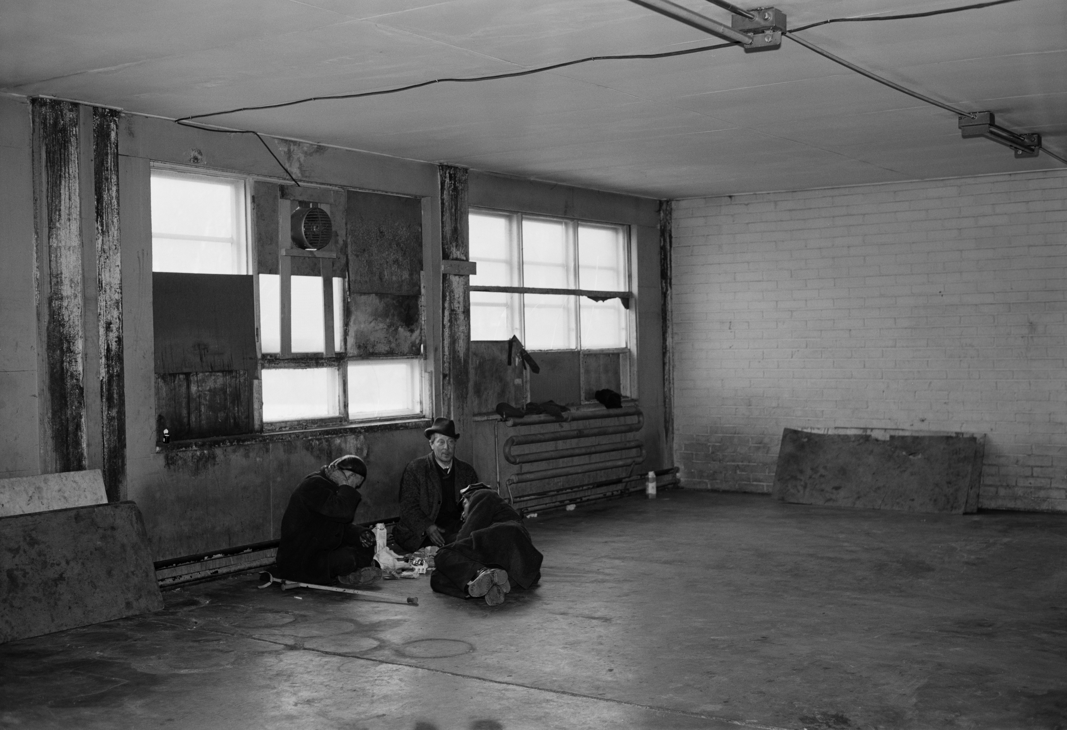 Kodittomien alkoholistien väliaikainen asuntola Liekkihotelli eli Lepakkoluola, Porkkalankatu 1. Asuntolan ylläpitäjänä toimi Suoja-Pirtti r.y. Liekkihotelli toimi vuosina 1967-79.